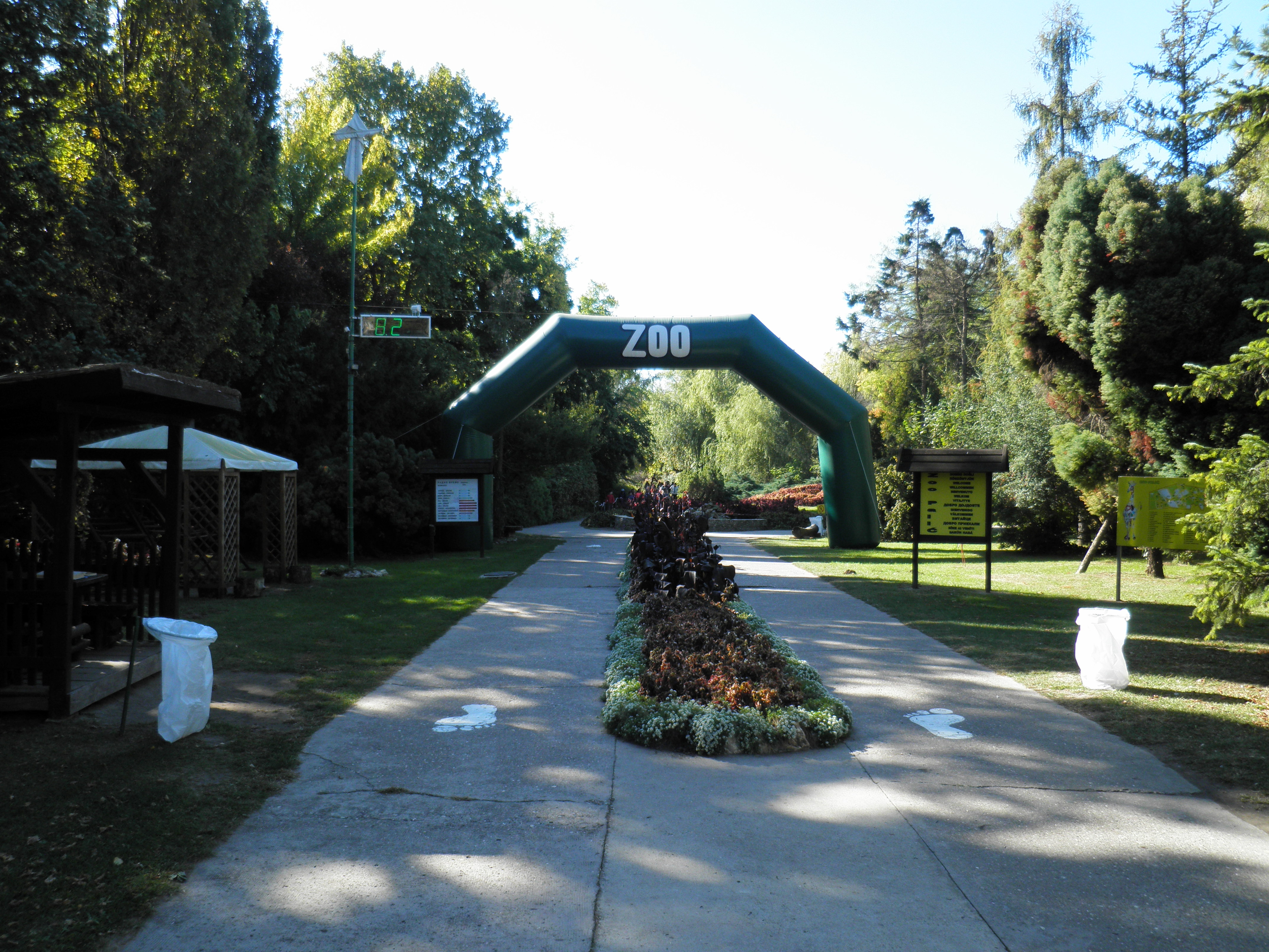 Palićko jezero - ZOO